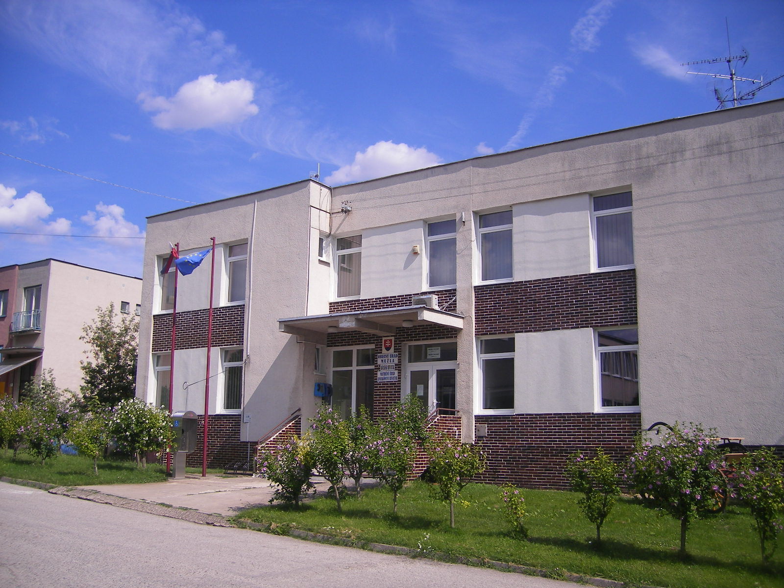 Muzsla - községháza